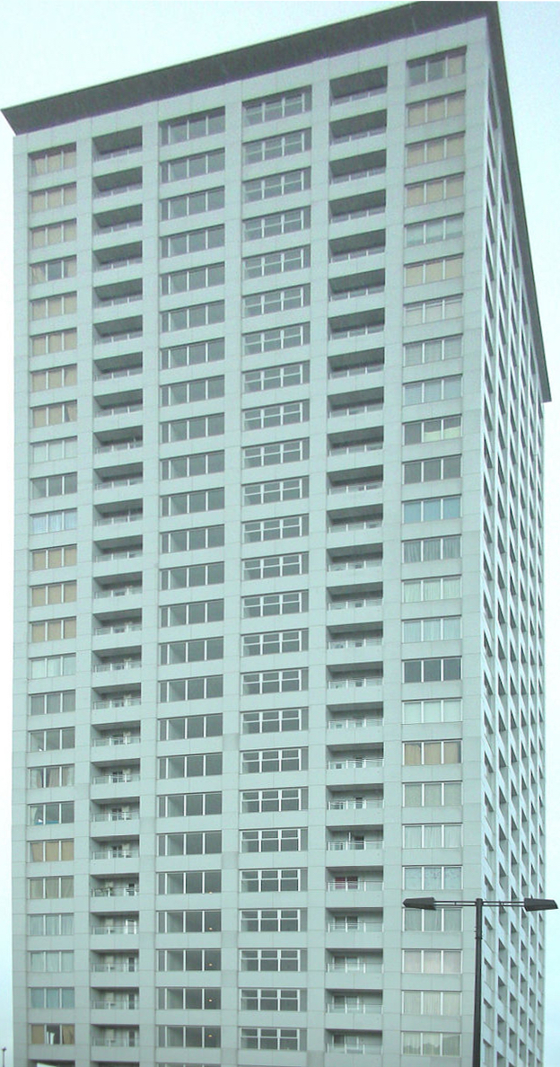 北九州市門司区の門司ミッドエア